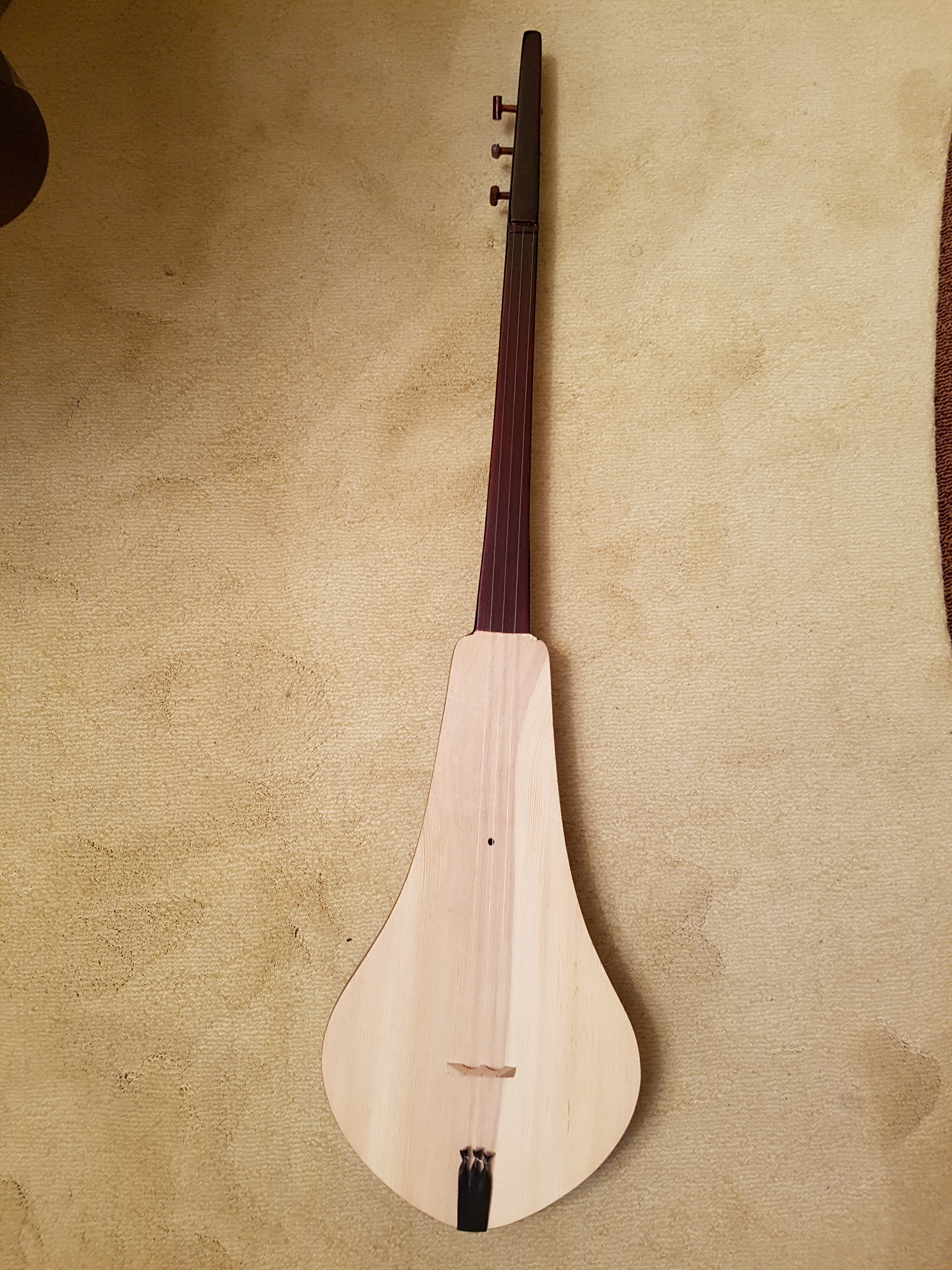 трехструнный кыргызский музыкальный инструмент